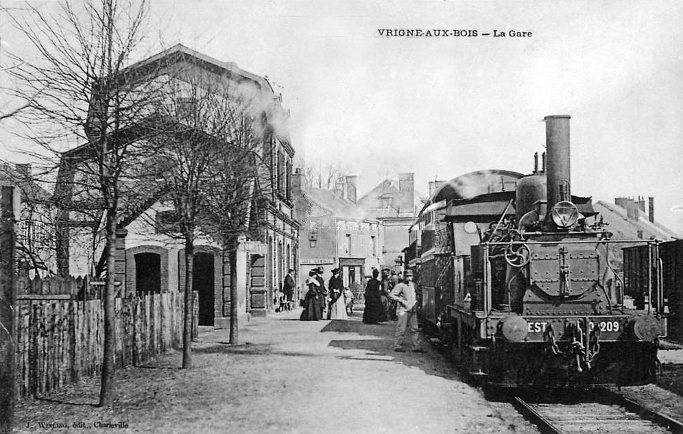 Intérieur de la gare de Vrigne-aux-Bois vers 1900. Avec la locomotive 030 T Est dénommée Zorn (n° 0.2009)